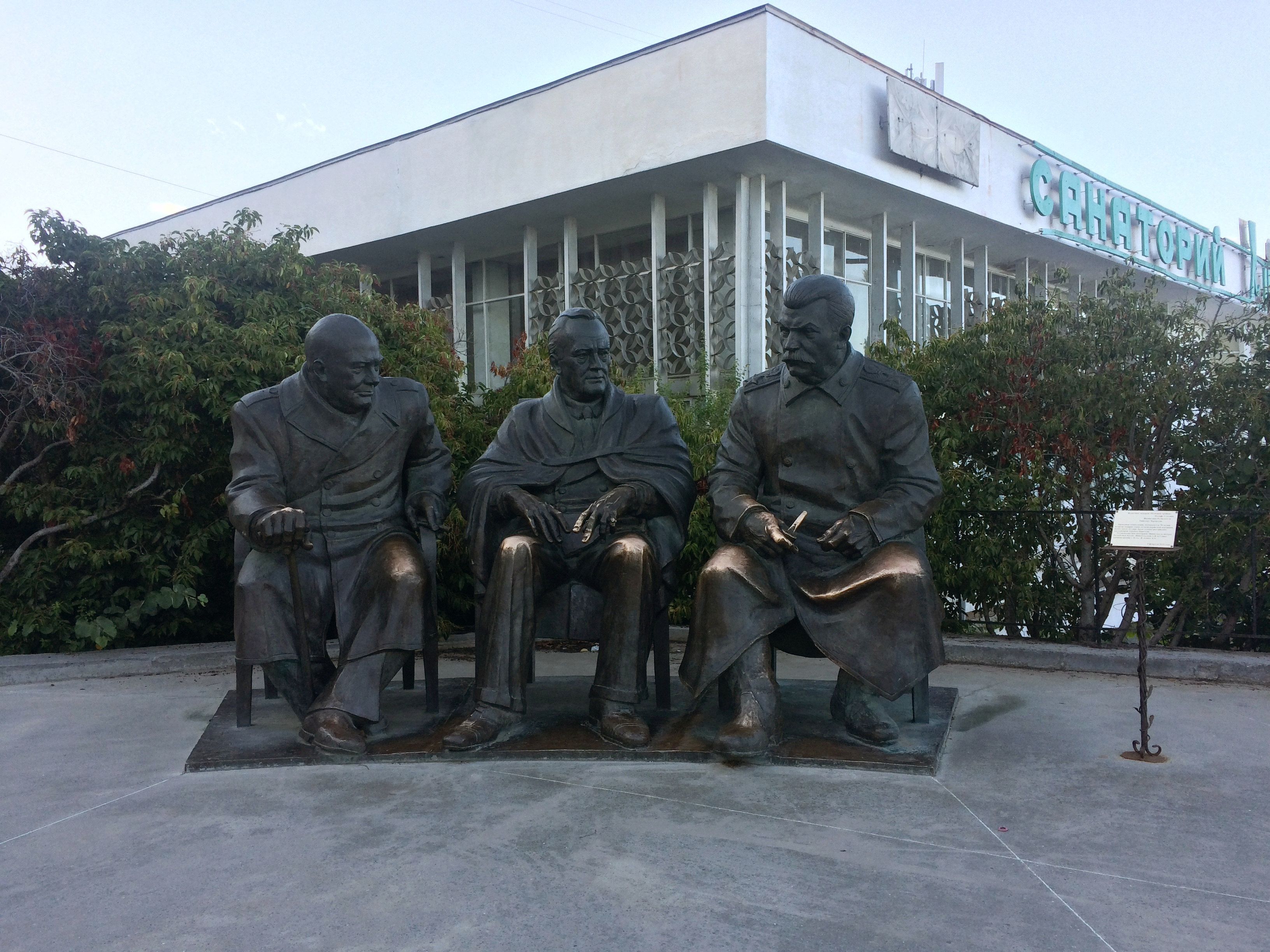 Памятник большой тройке